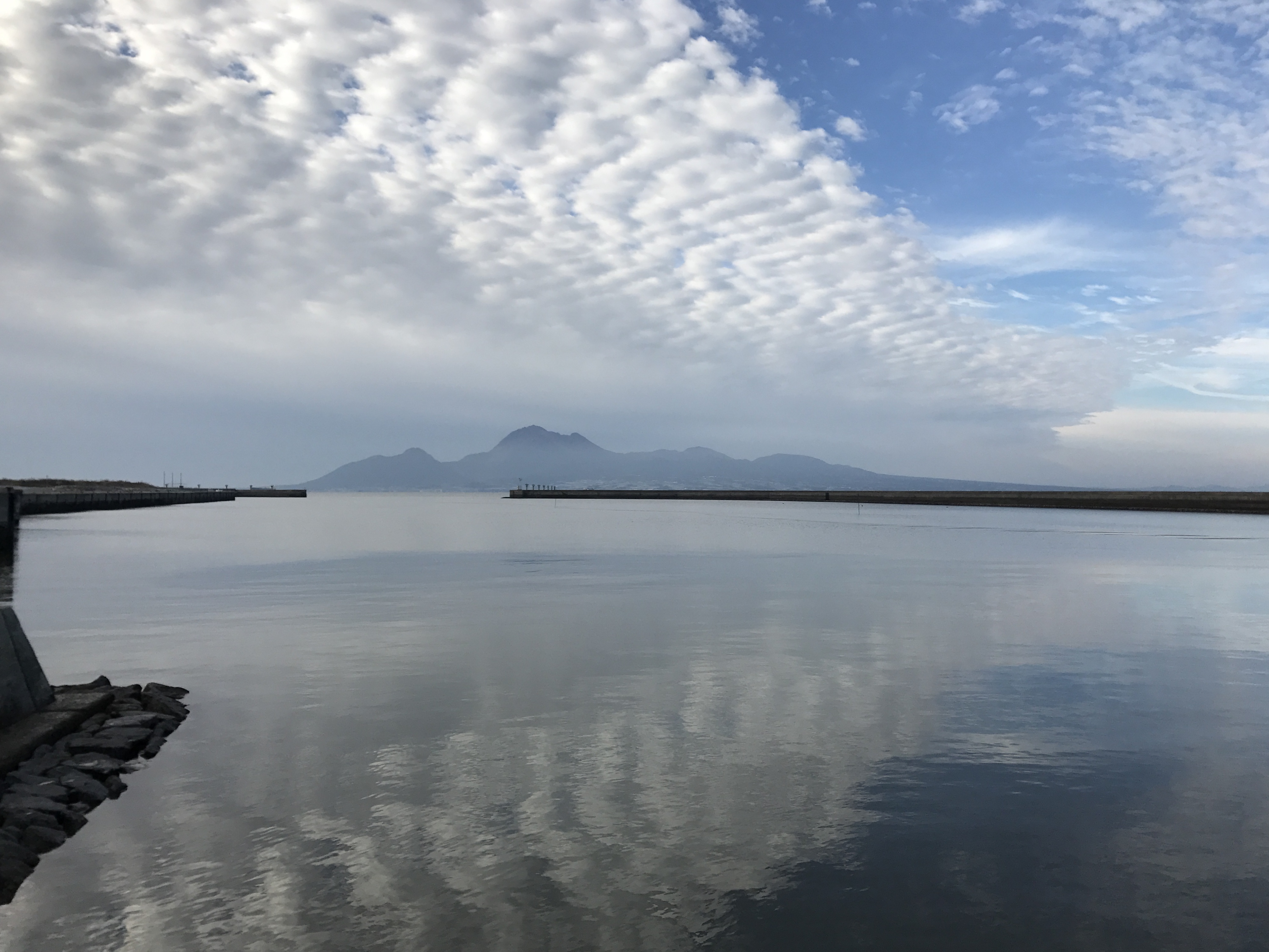 長洲港より望む有明海と雲仙岳